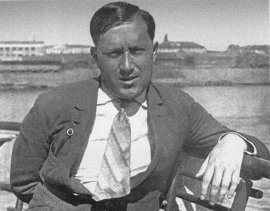 Писатель Александр Козачинский. Фото Ильи Ильфа